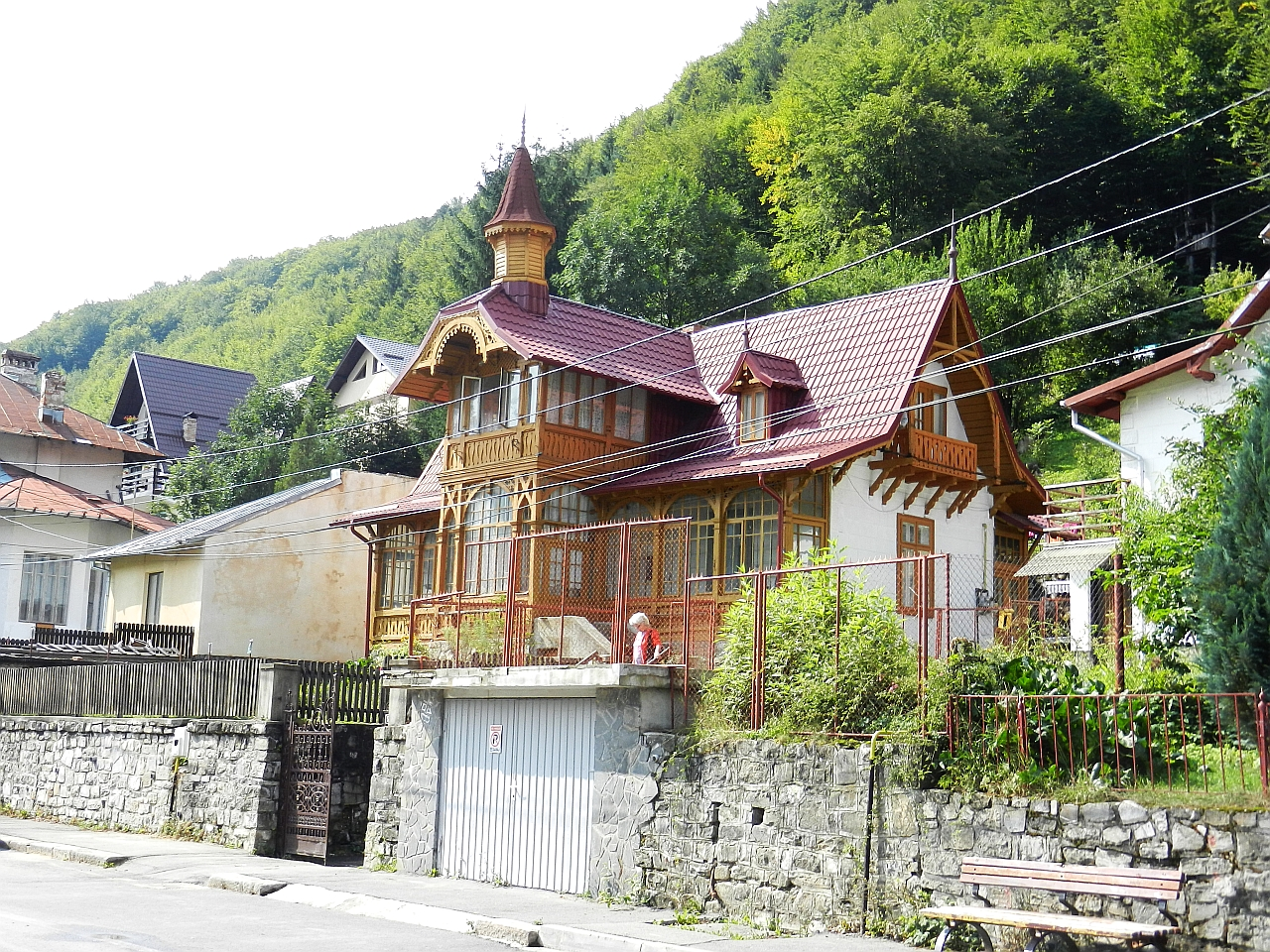 Casa Constantin Drăghici